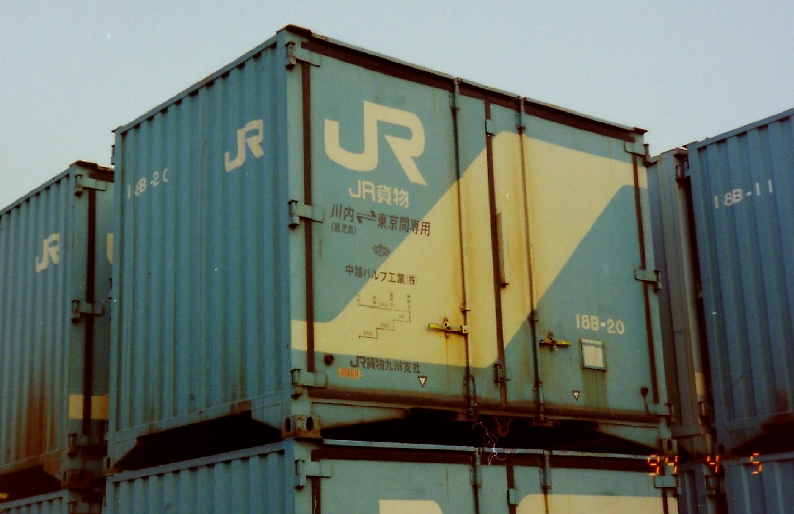 撮影地＝東京(タ)